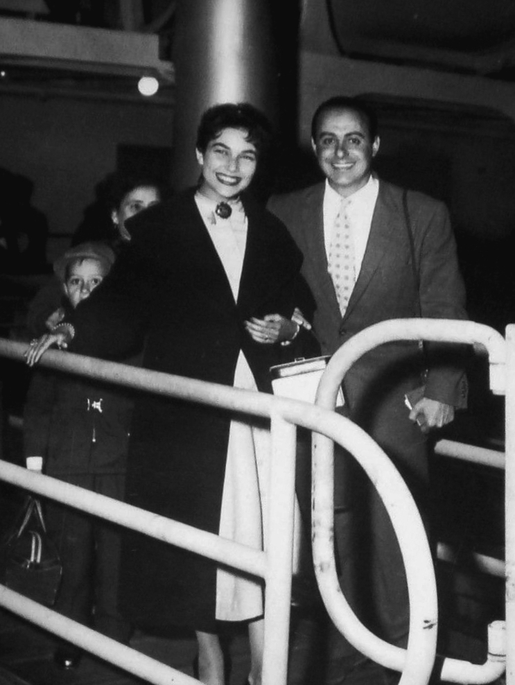 Rino Loddo e Maria Teresa Amore durante il viaggio di nozze in America Latina